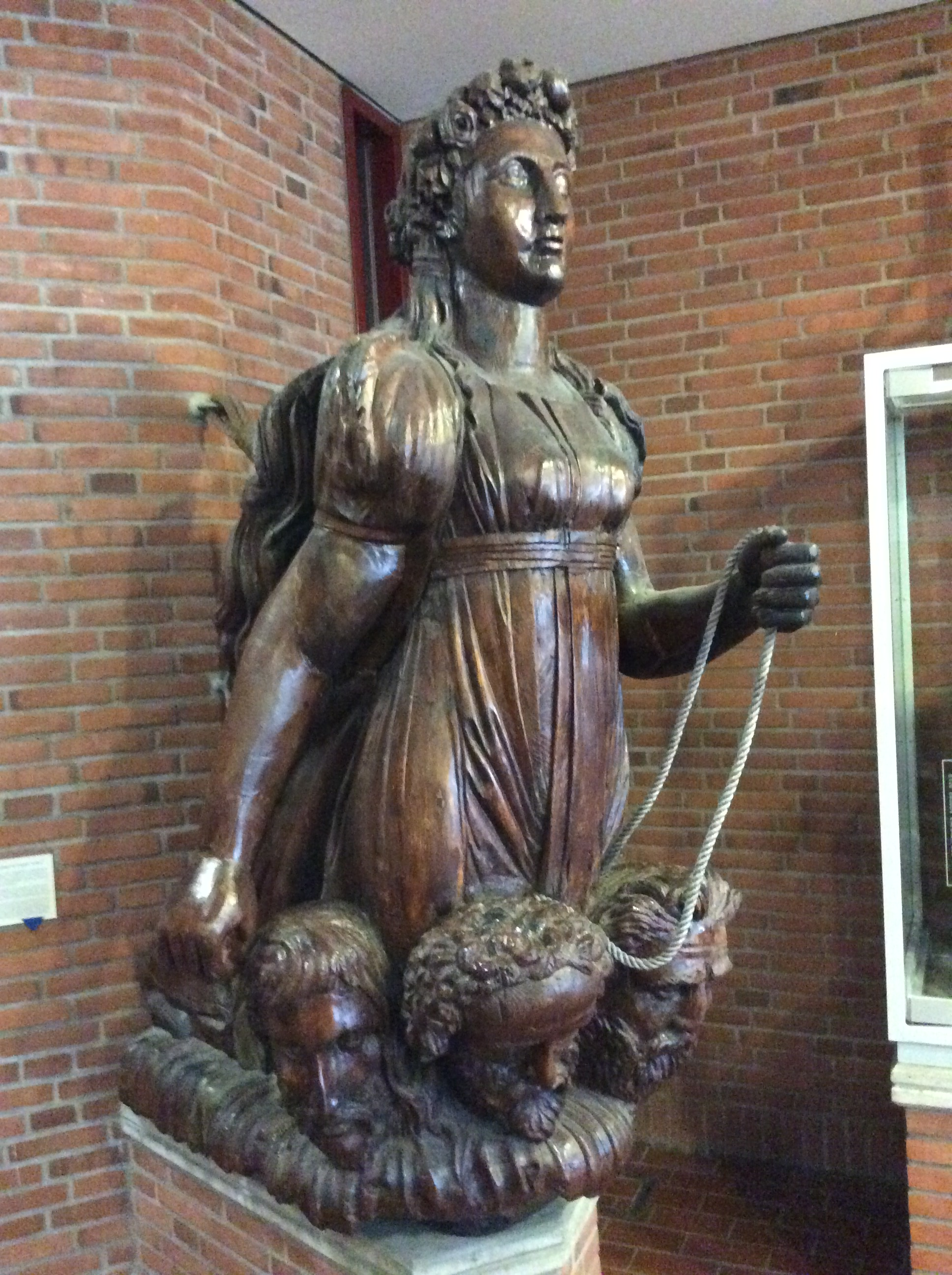 Die Galionsfigur aus Eichenholz entstand 1842/43 auf der Orlogswerft in Kopenhagen unter der Leitung von Professor Daniel Petersen. Der Entwurf stammt von Arthur Götting und zeigt die germanische Göttin Gefion mit ihren vier Söhnen. In den 1980er Jahren wurde das Original am Gefion-Brunnen durch eine Kopie ersetzt. Das Original steht nun im Eckernförder Rathaus.